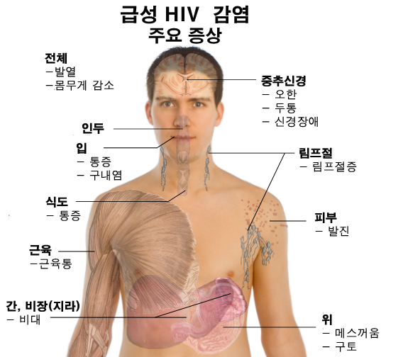 급성 HIV감염 주요증상.: Wikipedia:Ko:HIV#급성_HIV_감염. 모델: Mikael Häggström. 토론은 다음을 참조 Template_talk:Häggström diagrams